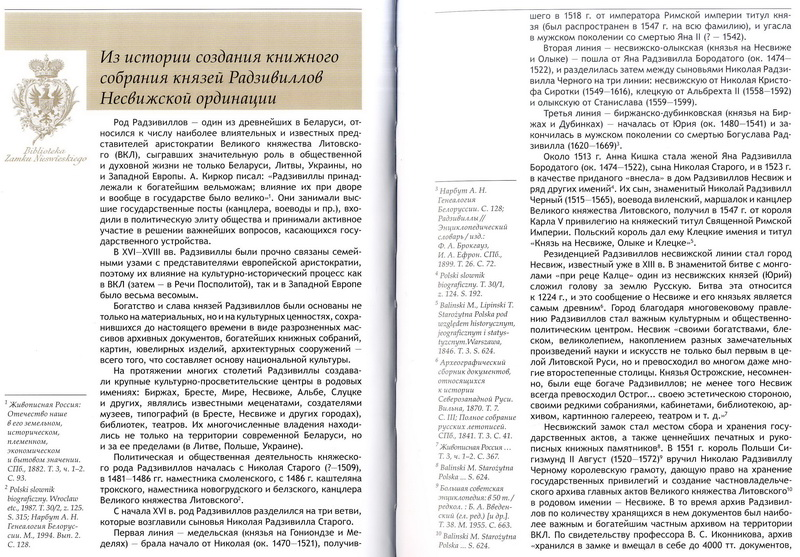 Уступны артыкул да каталога